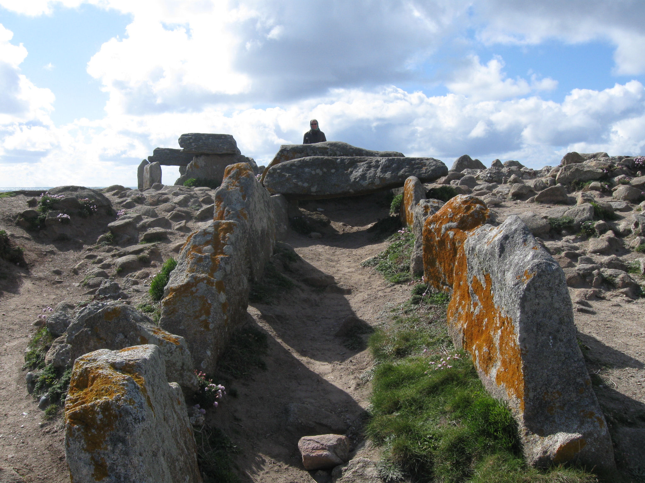 Dolmen von Pointe de la Torche, Finistère